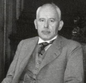 Hendrik van Boeijen (1889-1947), Nederlands politicus